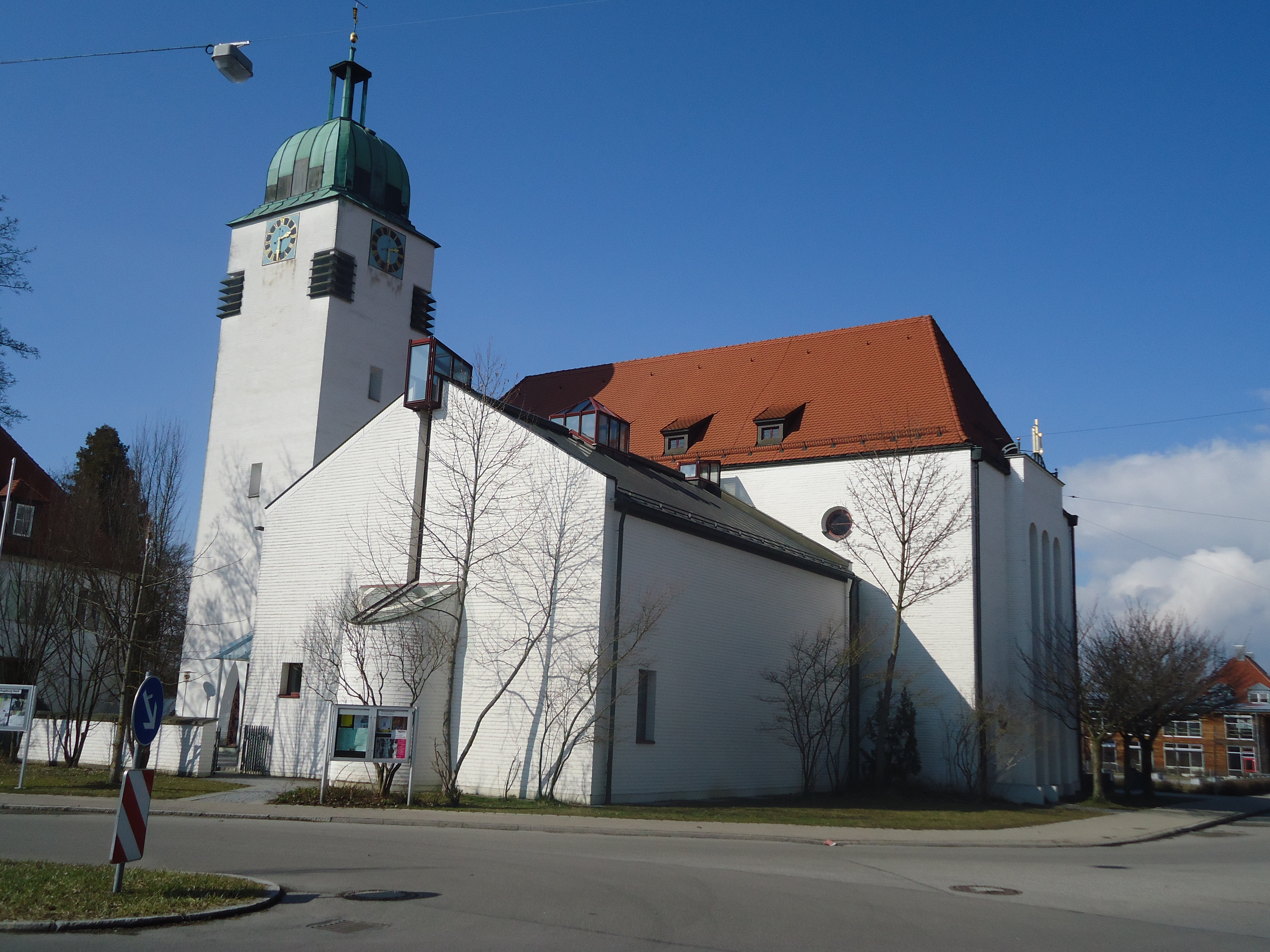 Kath. Kirche St. Franziskus Augsburg Firnhaberau